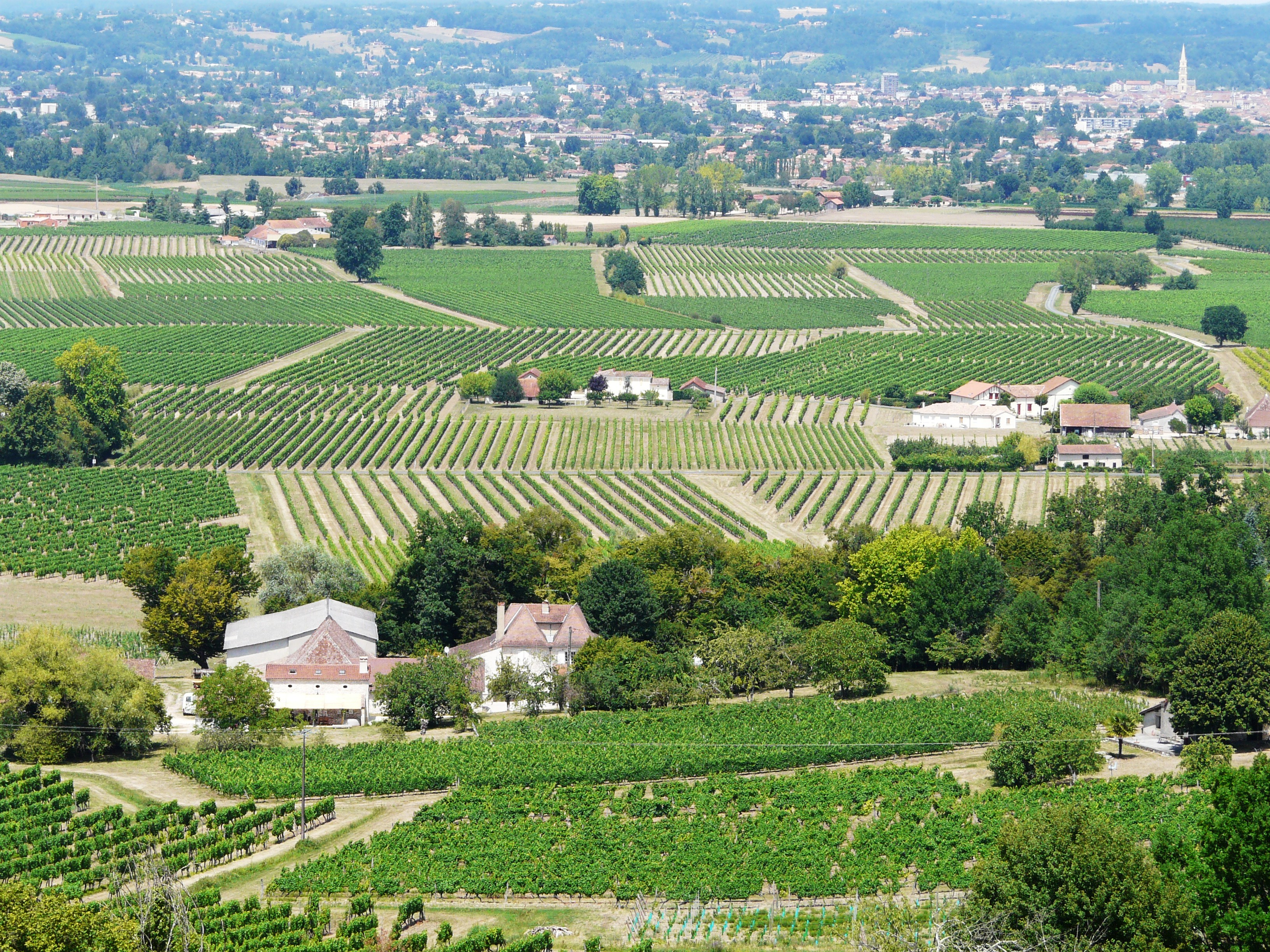 Le vignoble du Bergeracois au sud de Bergerac, Dordogne, France. En haut, à droite, la ville de Bergerac.